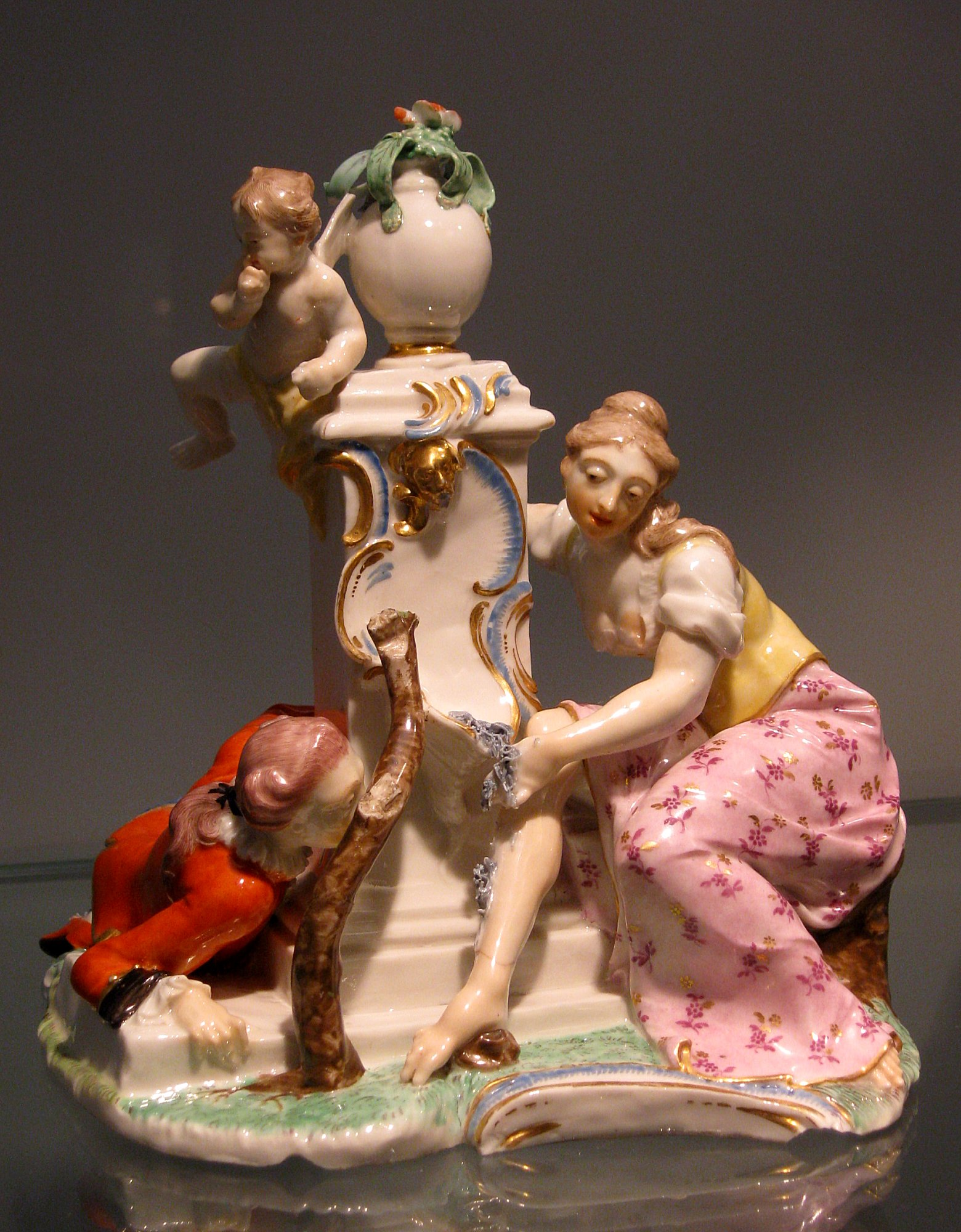 Franz Anton Bustelli: Liebesgruppe "Lauscher am Brunnen", um 1756, Porzellanmanufaktur Nymphenburg, Bayerisches Nationalmuseum in München